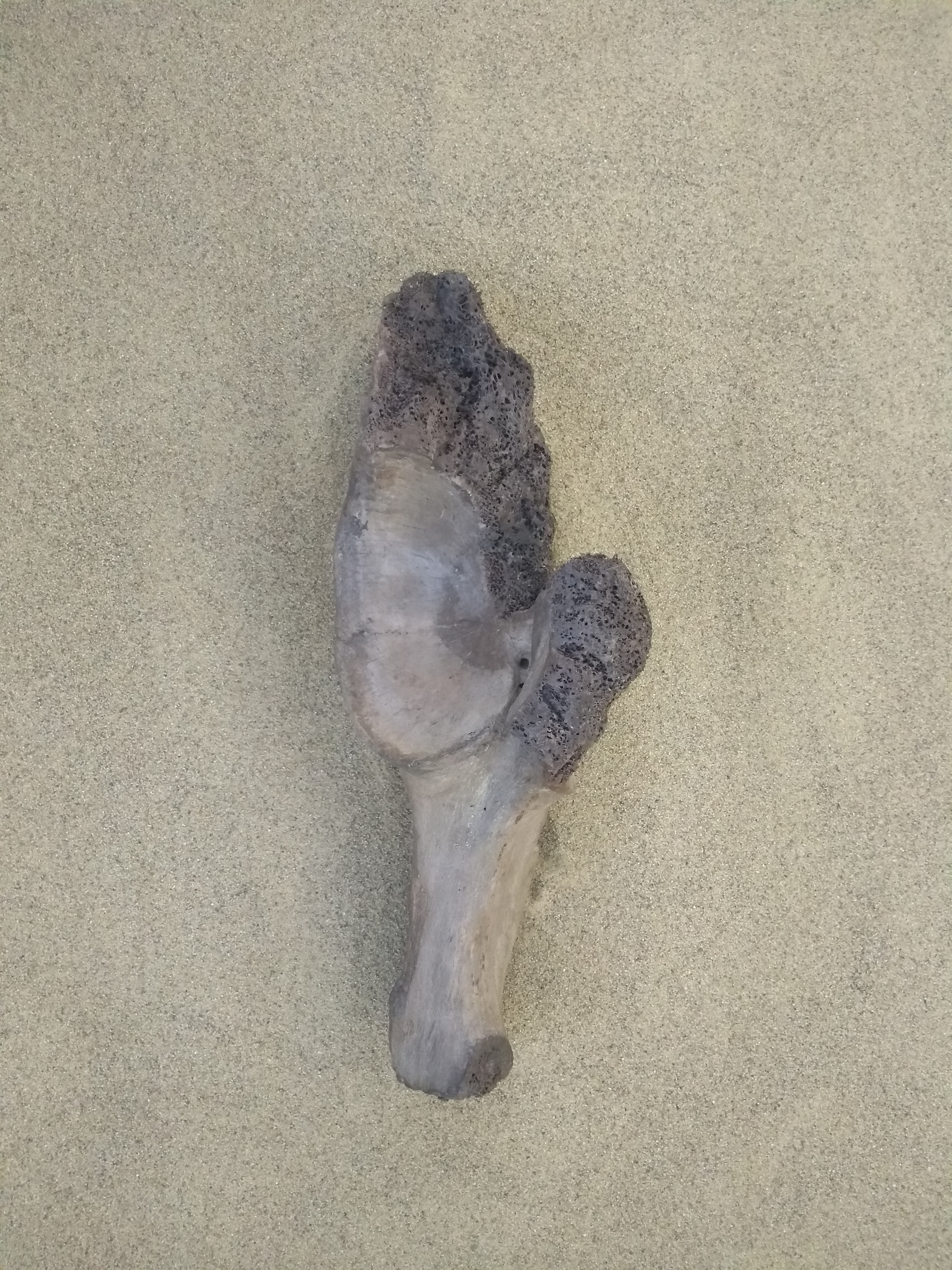 Replika kości słonia leśnego (Palaeoloxodon antiquus) znalezionej przy budowie stacji metra Płocka, prezentowana w przejściu podziemnym na stacji